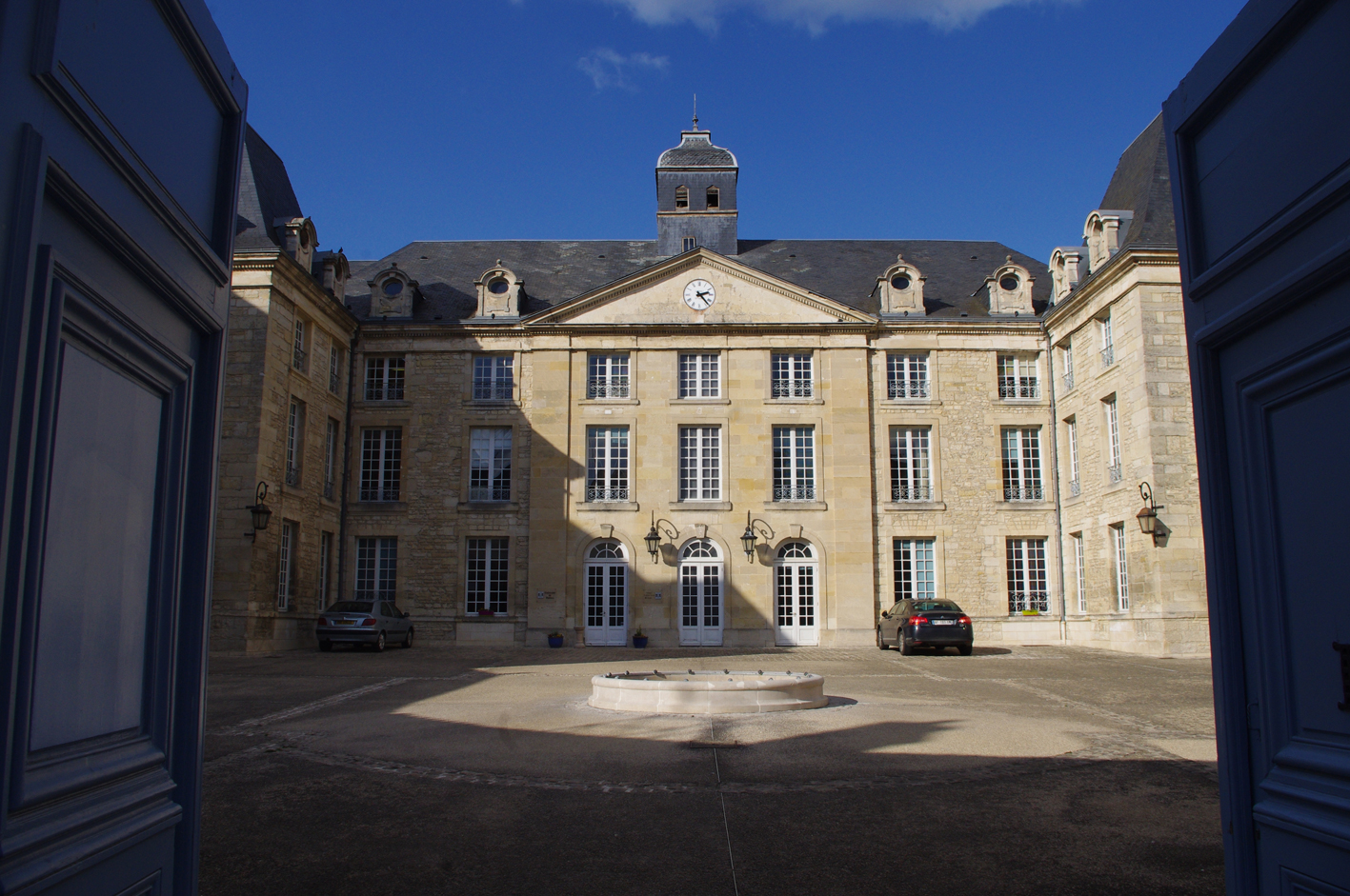 L'hôtel Pinet, édifiée à la fin du XVIIe siècle à Poitiers, ancien Séminaire, puis Hôtel-Dieu, aujourd'hui présidence de l'Université.